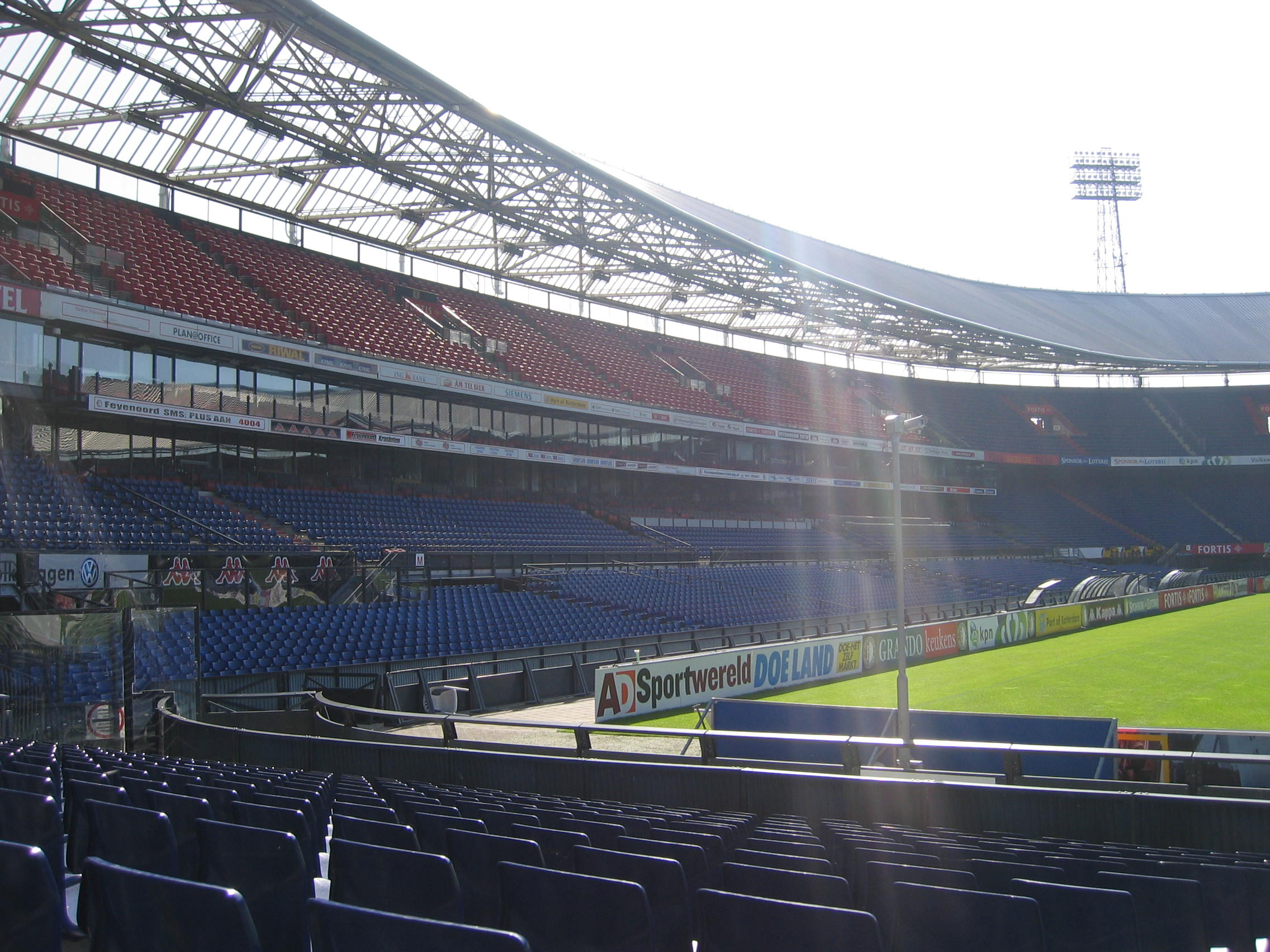 De Kuip gezien vanaf Vak X.